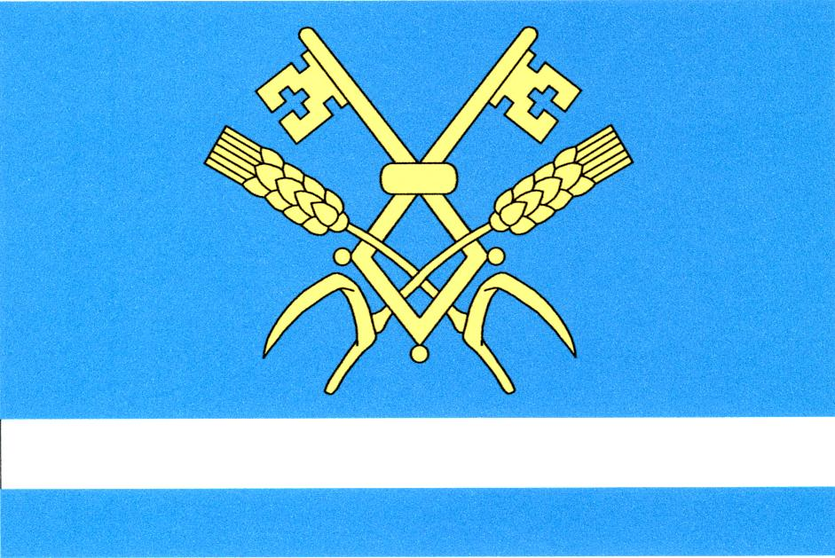 Vlajka obce Dvorce (okres Jihlava)